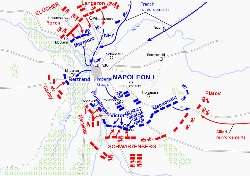 Völkerschlacht bei Leipzig: Plan der Truppenaufstellung und Aktionen am 16. Oktober 1813